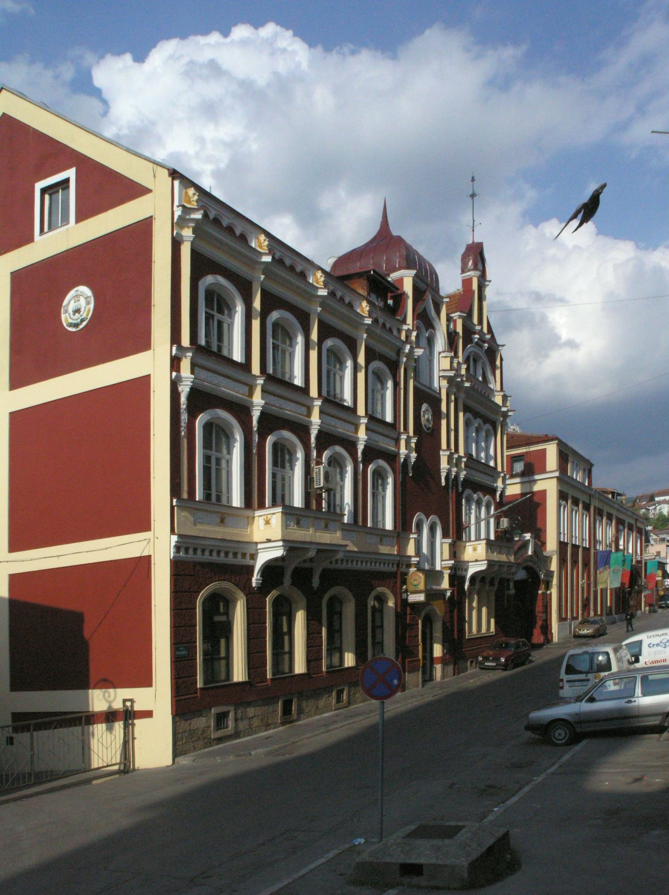 BiH, Sarajevo - brewery